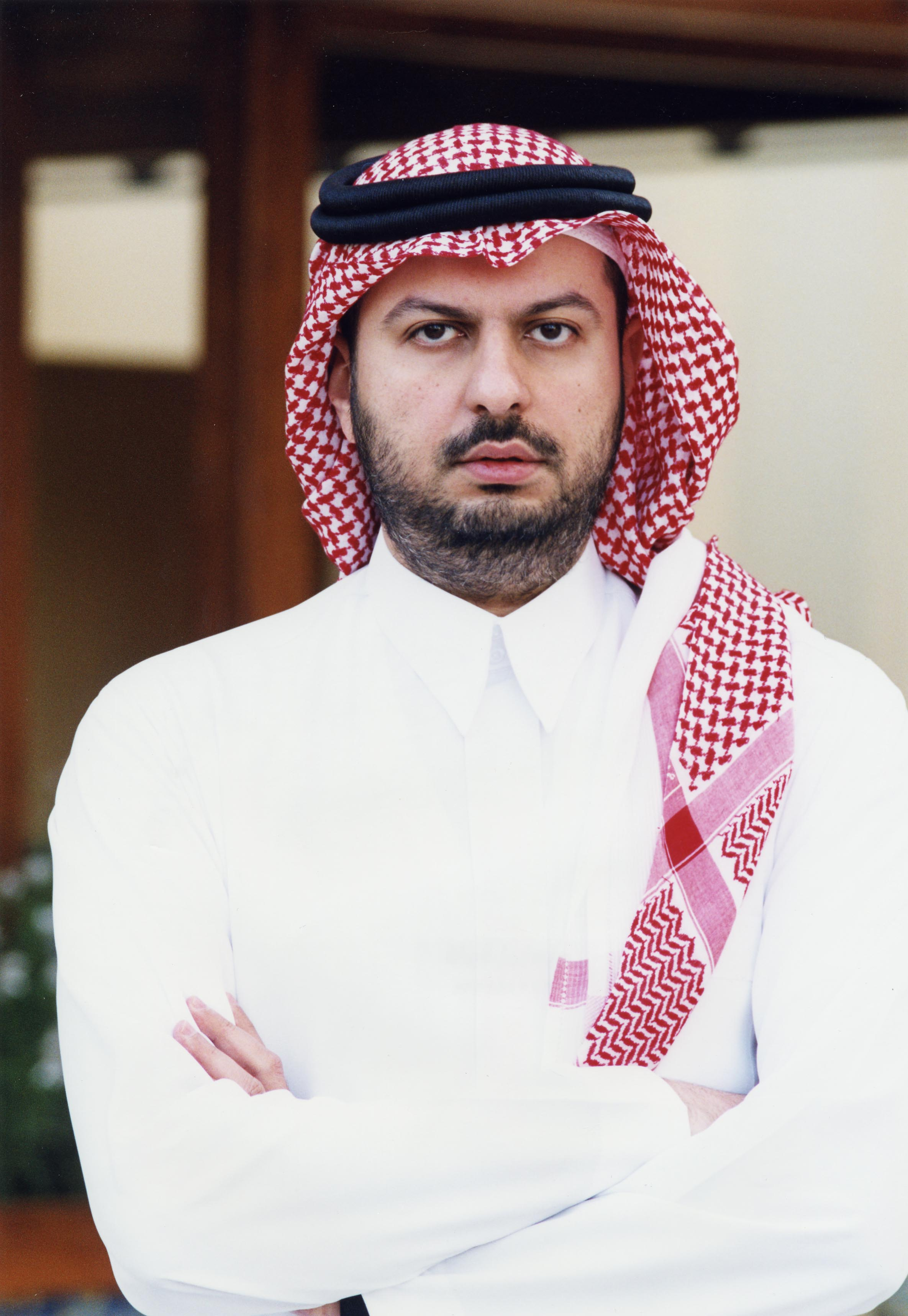 الأمير عبدالله بن مساعد بن عبدالعزيز آل سعود أحد أبناء الأمير مساعد بن عبد العزيز آل سعود